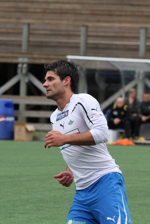 Daniel Aga i aksjon